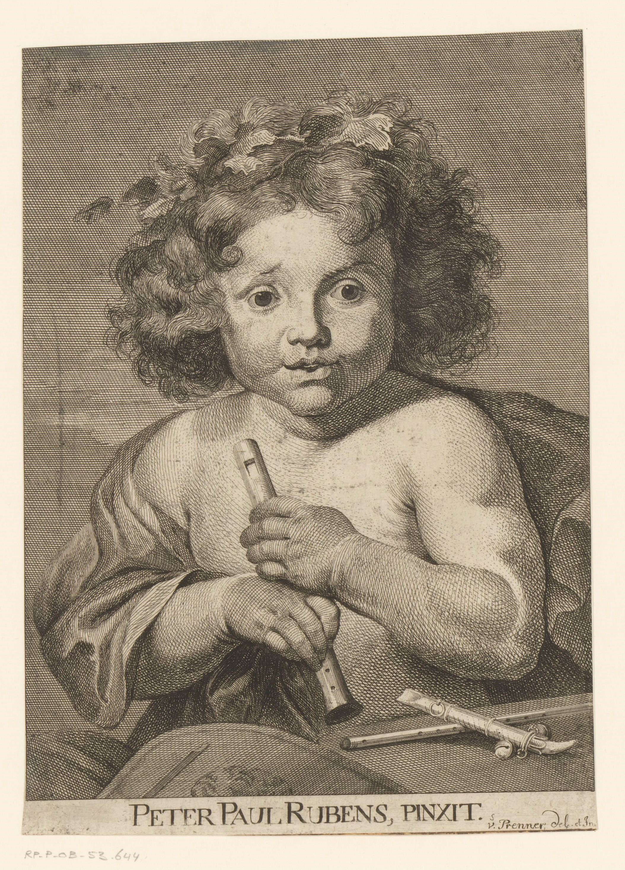 IdentificatieTitel(s): Kind met een fluitObjecttype: prent Objectnummer: RP-P-OB-53.644Opschriften / Merken: verzamelaarsmerk, verso, gestempeld: Lugt 2228VervaardigingVervaardiger: prentmaker: Anton Joseph von Prenner (vermeld op object)naar schilderij van: Peter Paul Rubens (vermeld op object)Datering: 1728Fysieke kenmerken: etsMateriaal: papier Techniek: etsenAfmetingen: blad: h 229 mm (binnen de plaatrand afgesneden) × b 163 mm (binnen de plaatrand afgesneden)ToelichtingPrent ook gebruikt in: Prenner, Anton Joseph. Theatrum Artis Pictoriae. Wenen: Anton Joseph Prenner, 1728.OnderwerpWat: childvine-tendril, leafflute, aulos, tibiaVerwerving en rechtenVerwerving: overdracht van beheer 1816Copyright: Publiek domein